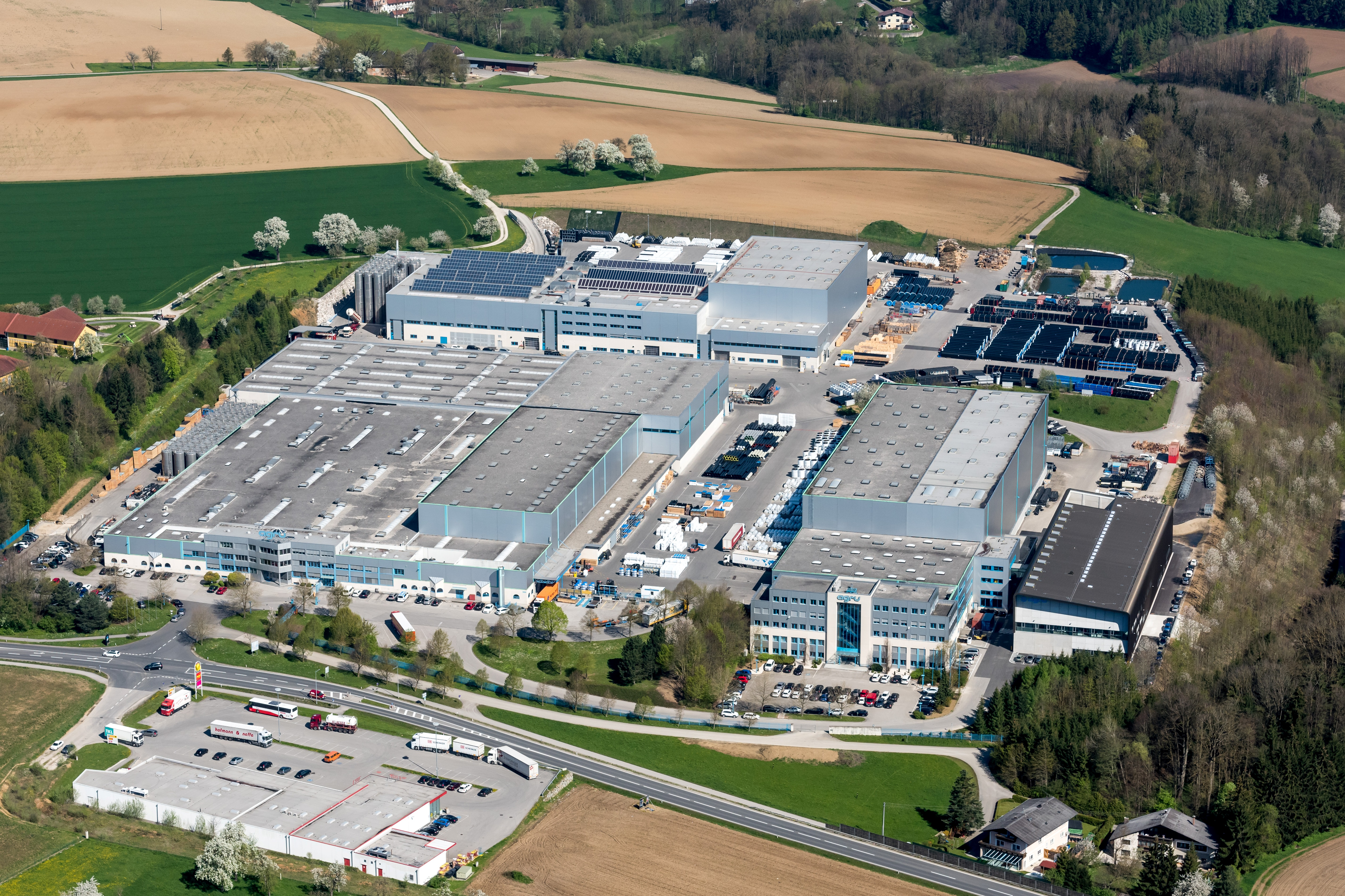 AGRU Werke 2-5 in Bad Hall